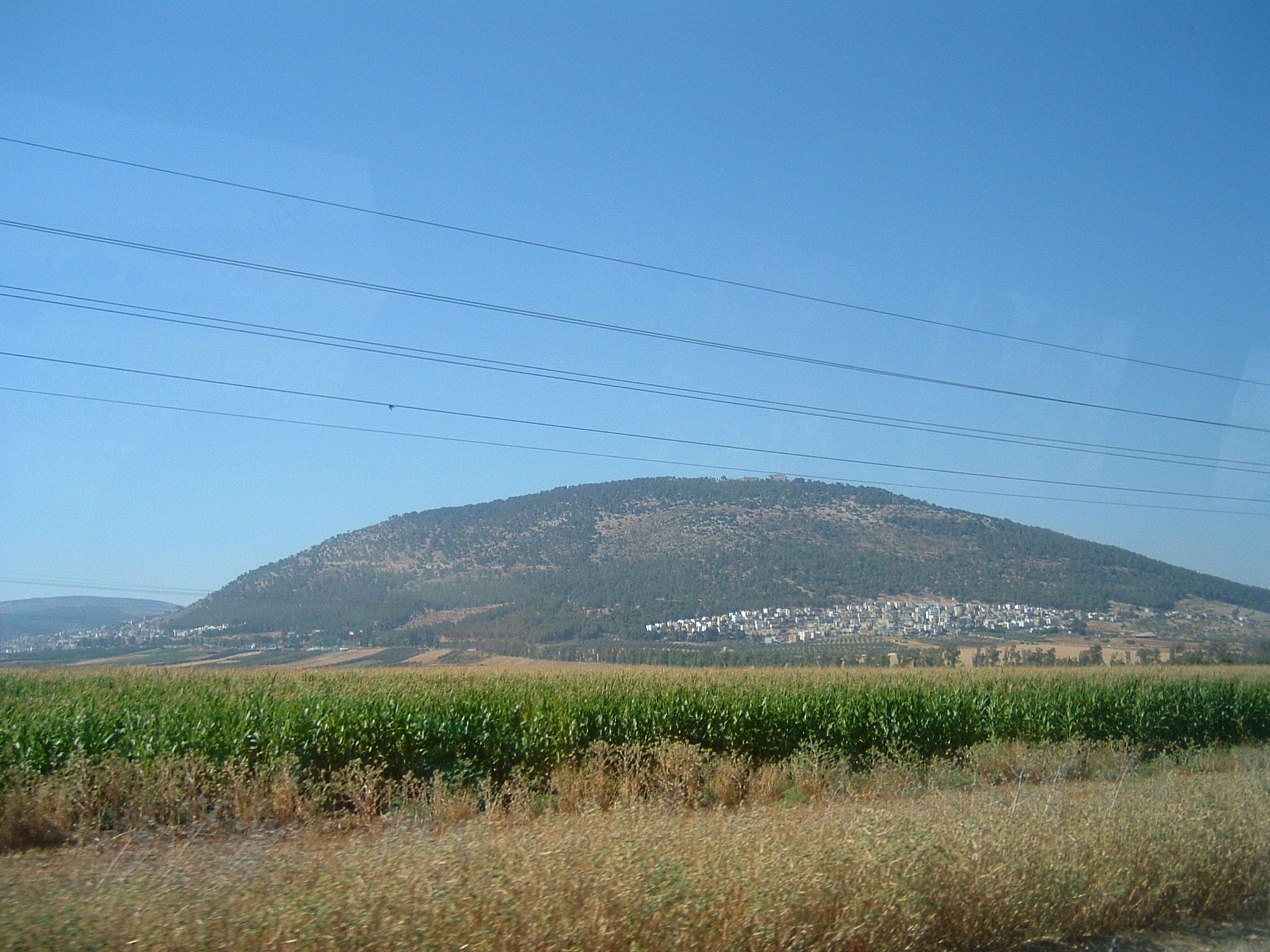 Foto scattata da me il 13 giugno 2008 Il monte Tabor